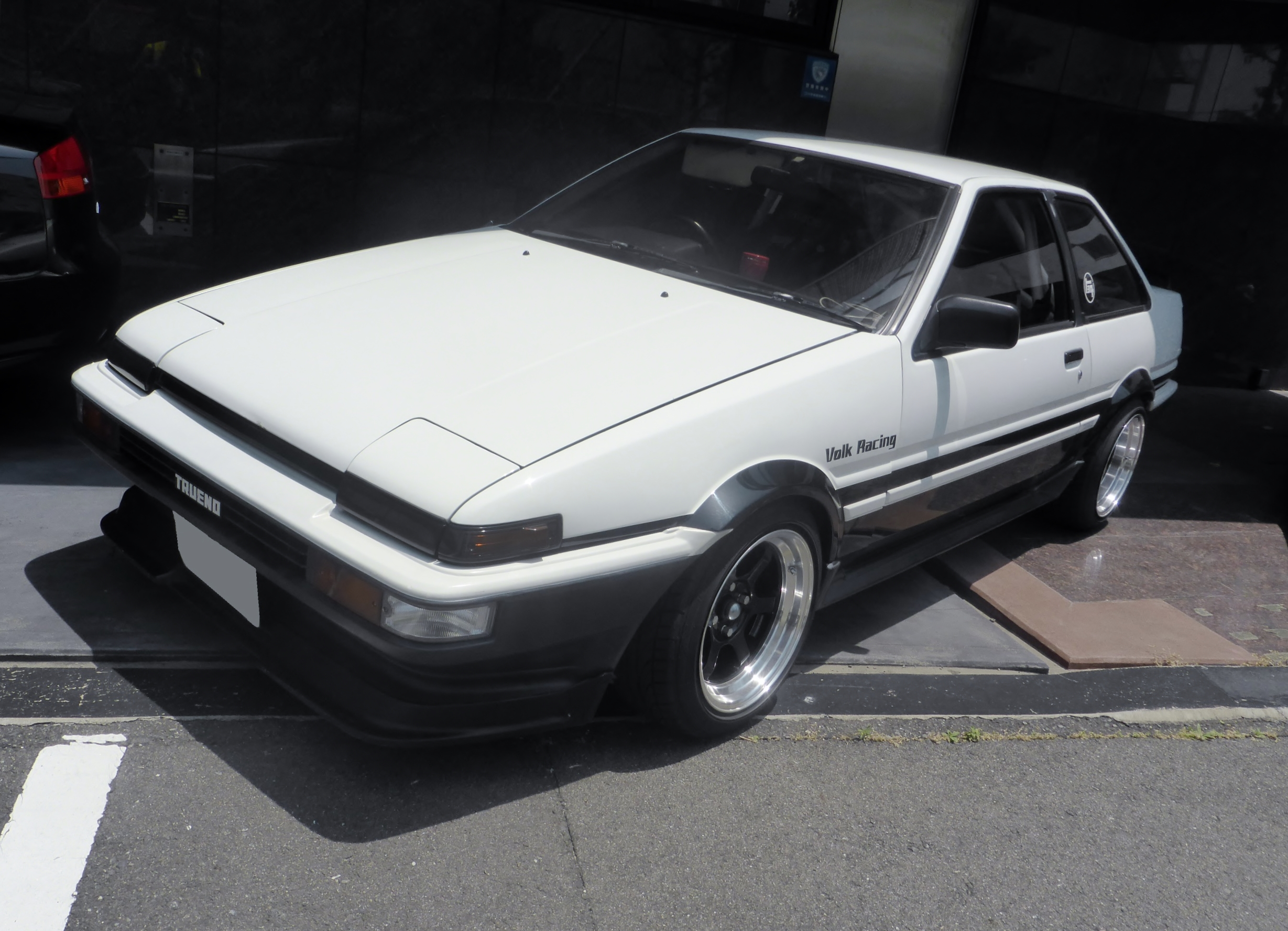 ボルクレーシングのホイールを装着したE-AE86-FSMVF後期型トヨタ・スプリンタートレノGT APEXをフロントから撮影。